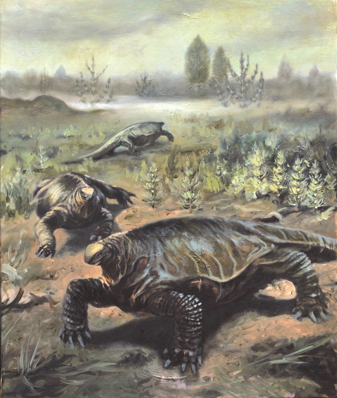 In vivo reconstruction of Alierasaurus ronchii by the Italian artist Emiliano Troco (oil on canvas).